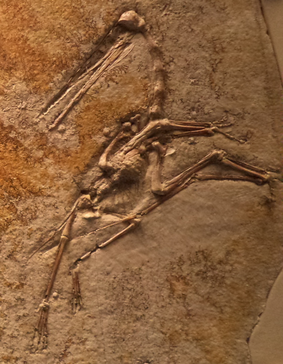 Pterodactylus muscle impressions